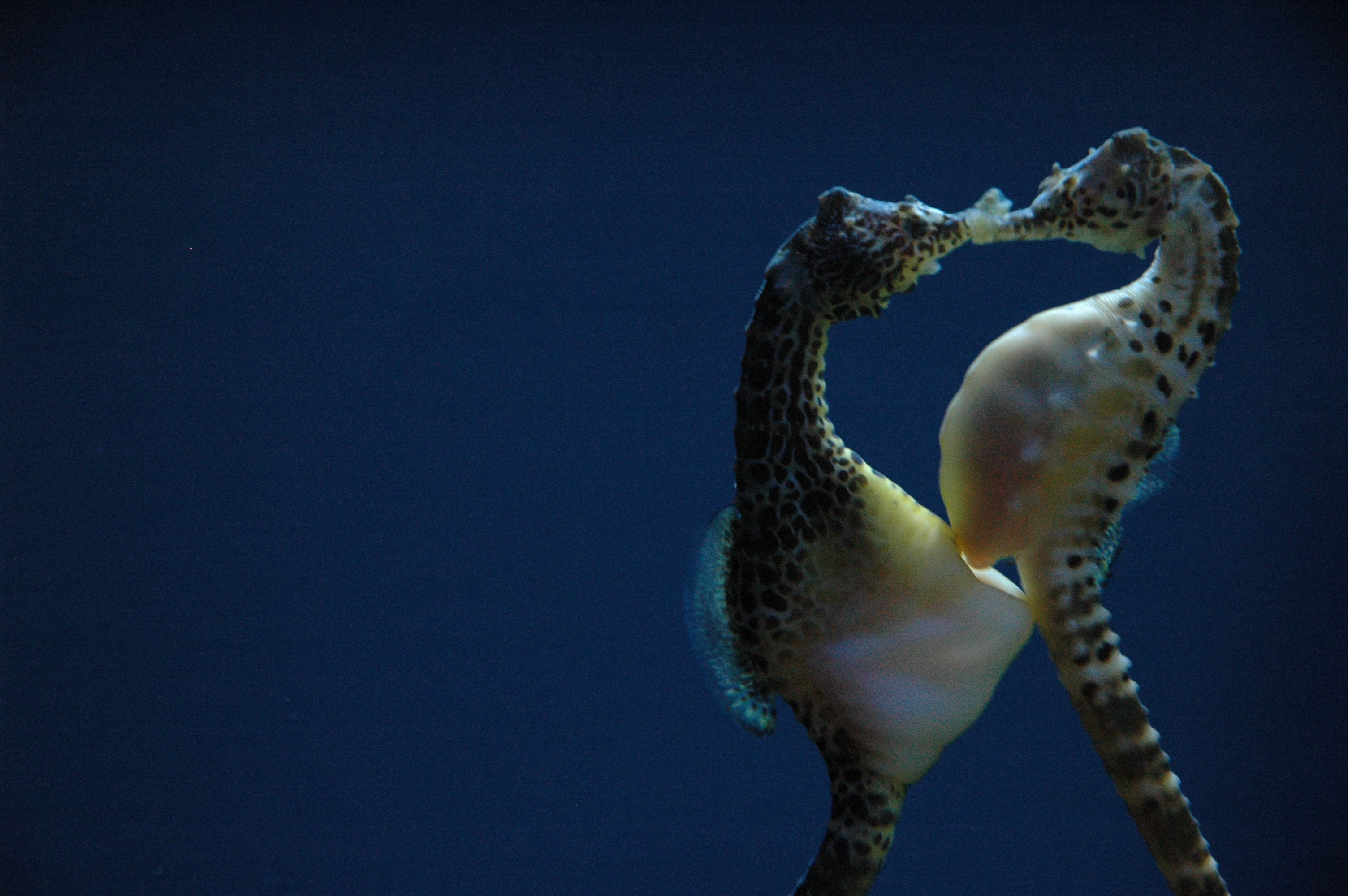 Hippocampus abdominalis, apareamiento. Monterey Bay Aquarium, California, Estados unidos